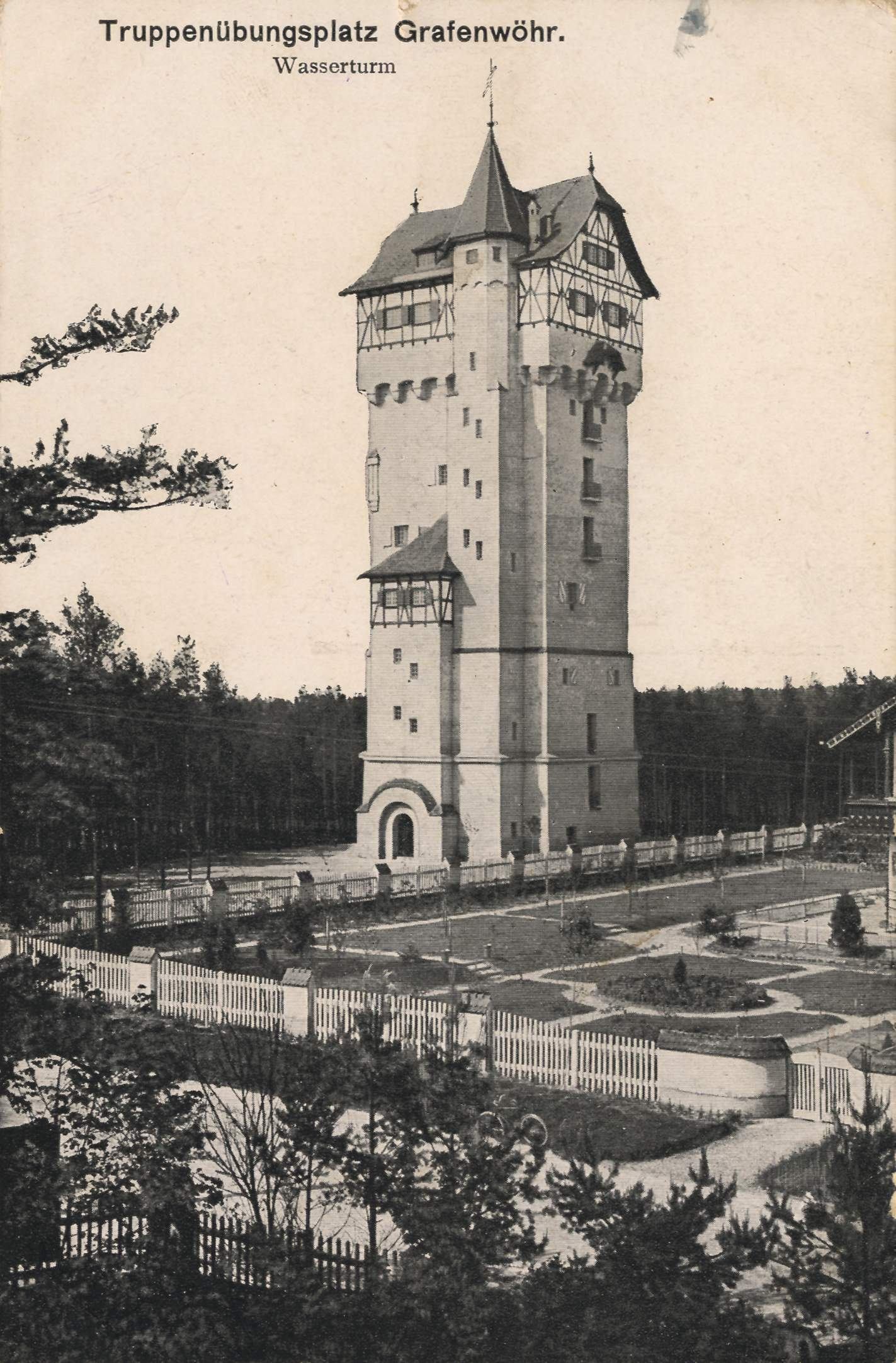 Bildseite der Ansichtskarte mit der fortlaufenden Nummer 375 aus dem Verlag von P. H. B. mit einer Ansicht des von dem Architekten Wilhelm Kemmler am Truppenübungsplatz Grafenwöhr errichteten Wasserturm, der zum Wahrzeichen der Stadt Grafenwöhr werden sollte ...